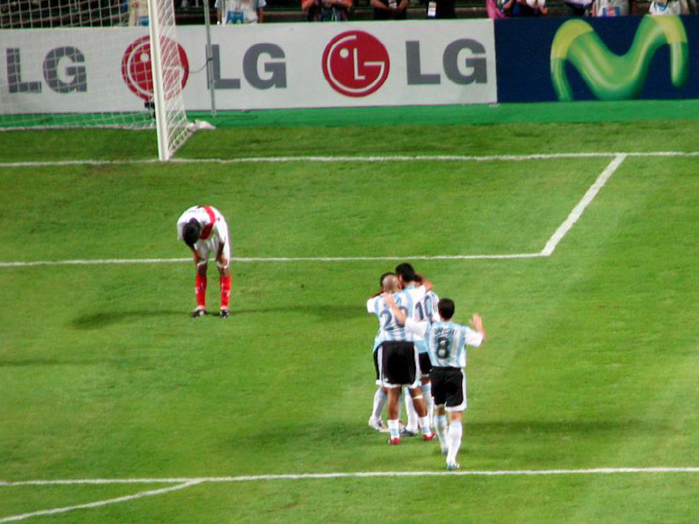 Argentina celebra un gol ante Perú, Copa América 2007, Venezuela.Copa América_9